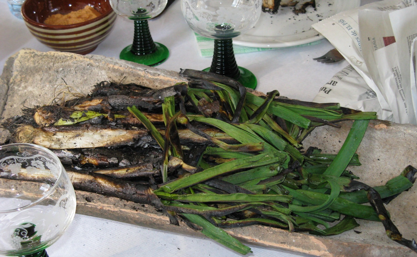 Calçots (Catalan meal)